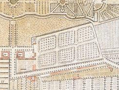 Marlygarten auf dem Plan des friderizianischen Parks Sanssouci von Friedrich Zacharias Saltzmann (1772)